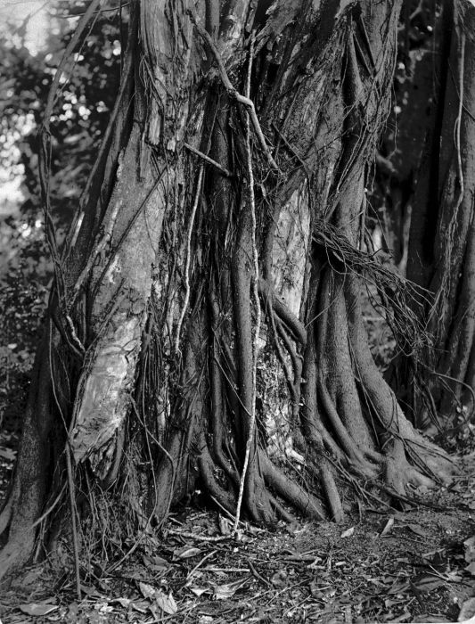 Foto. De boom Gummi Arabicum, waar arabisch gom van wordt gemaakt.